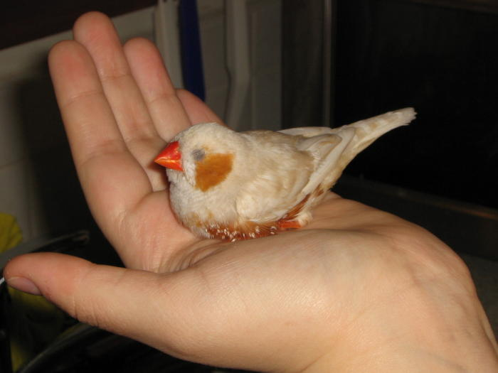 Slapende Isabel man (Taeniopygia guttata)